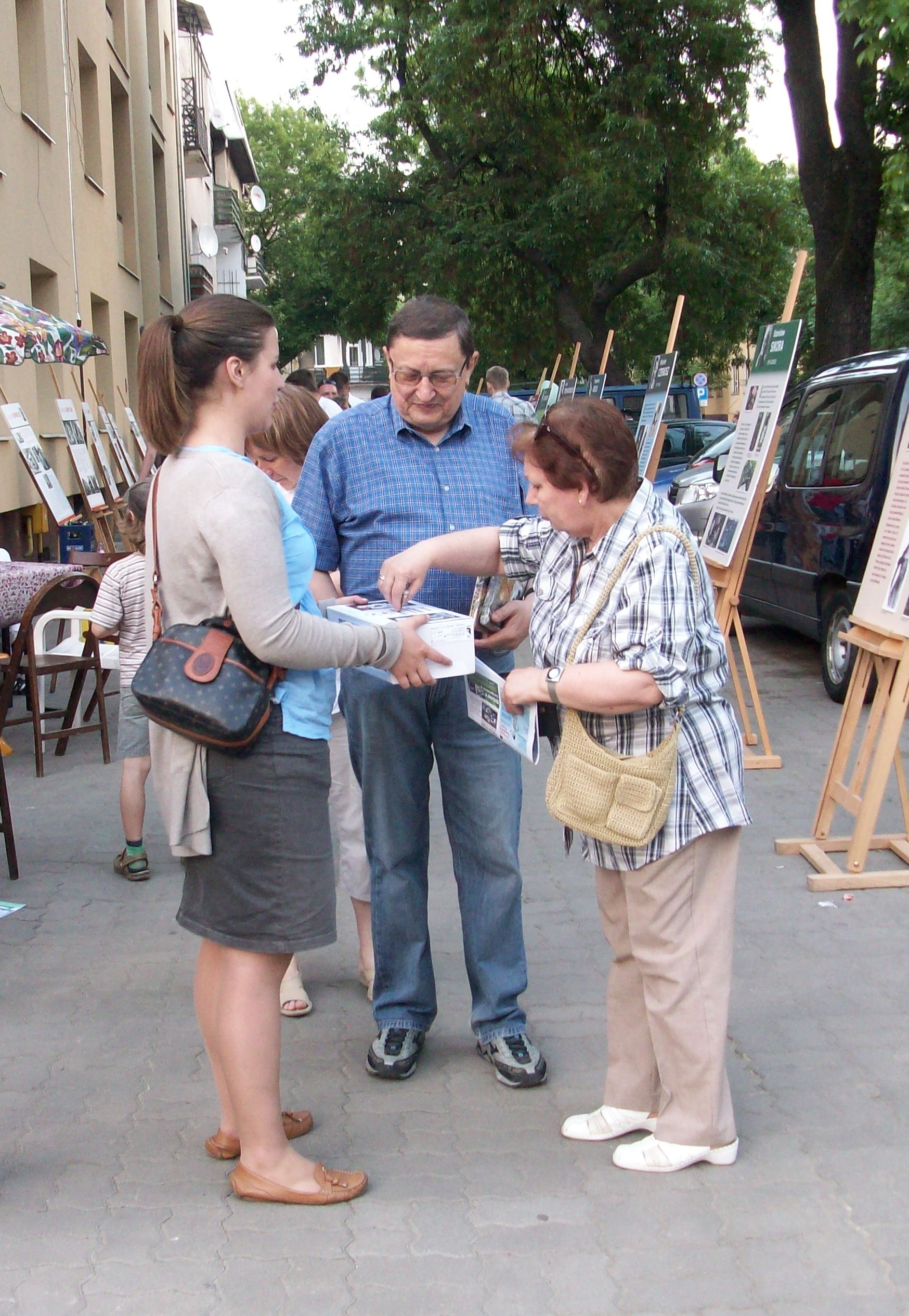 Zbiórka funduszy na renowację płaskorzeźby Plon w czasie Święta Saskiej Kępy w 2011 roku